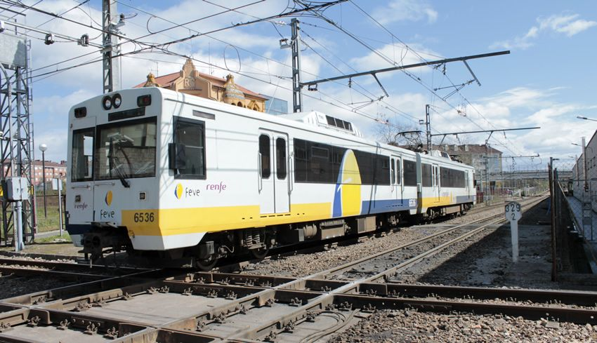 Unidad 6536 que corresponen a la 3536 sin remolque a su paso por la estación asturiana de El Berrón